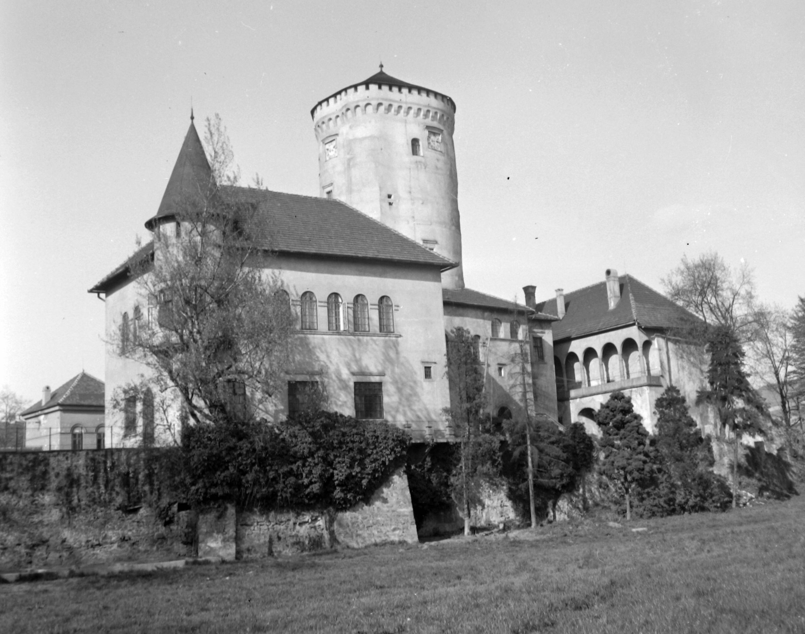 Budatin vára. Location: Slovakia, Zilina Tags: Czechoslovakia Title: Budatin vára.